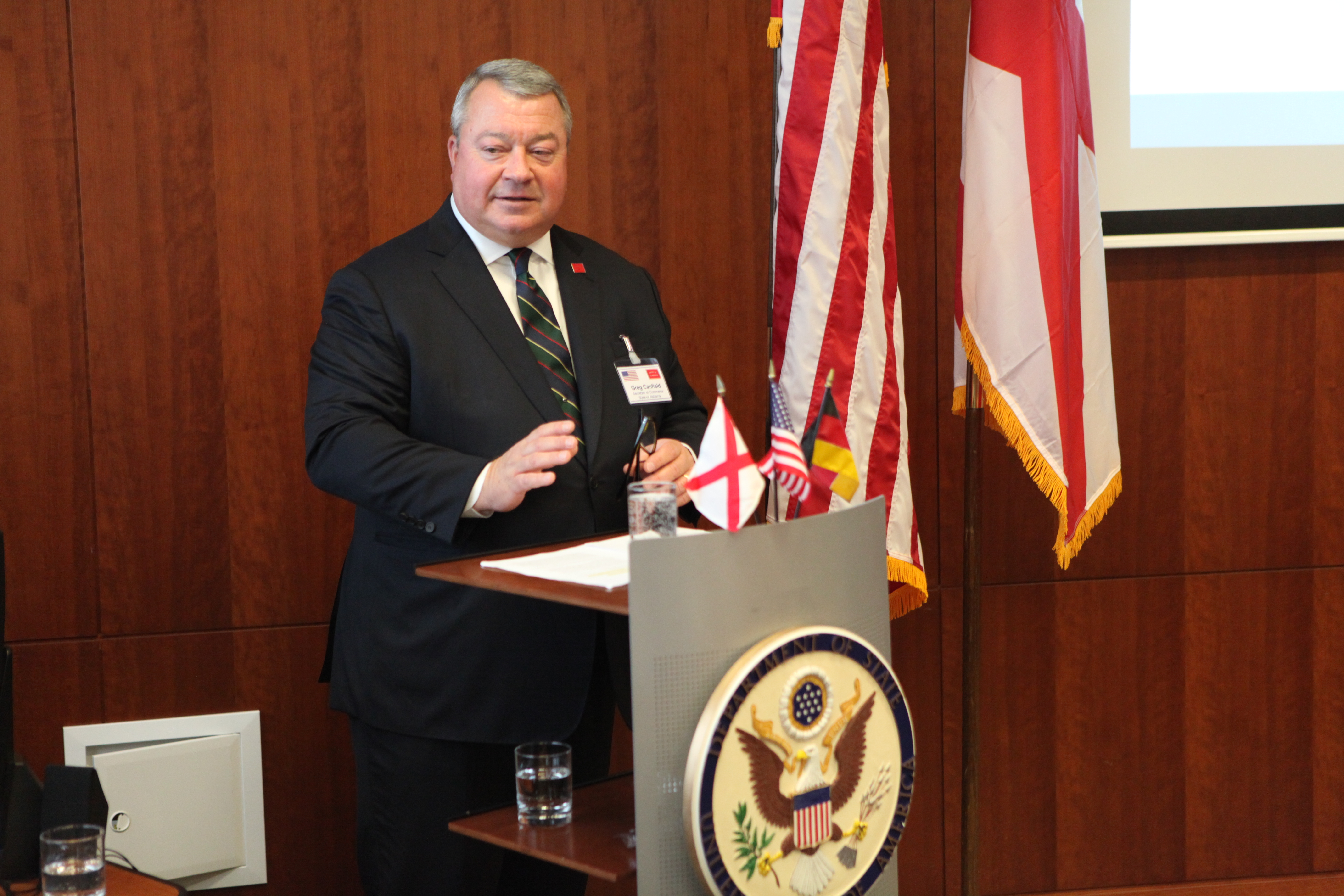 Greg Canfield in Berlin, 2017